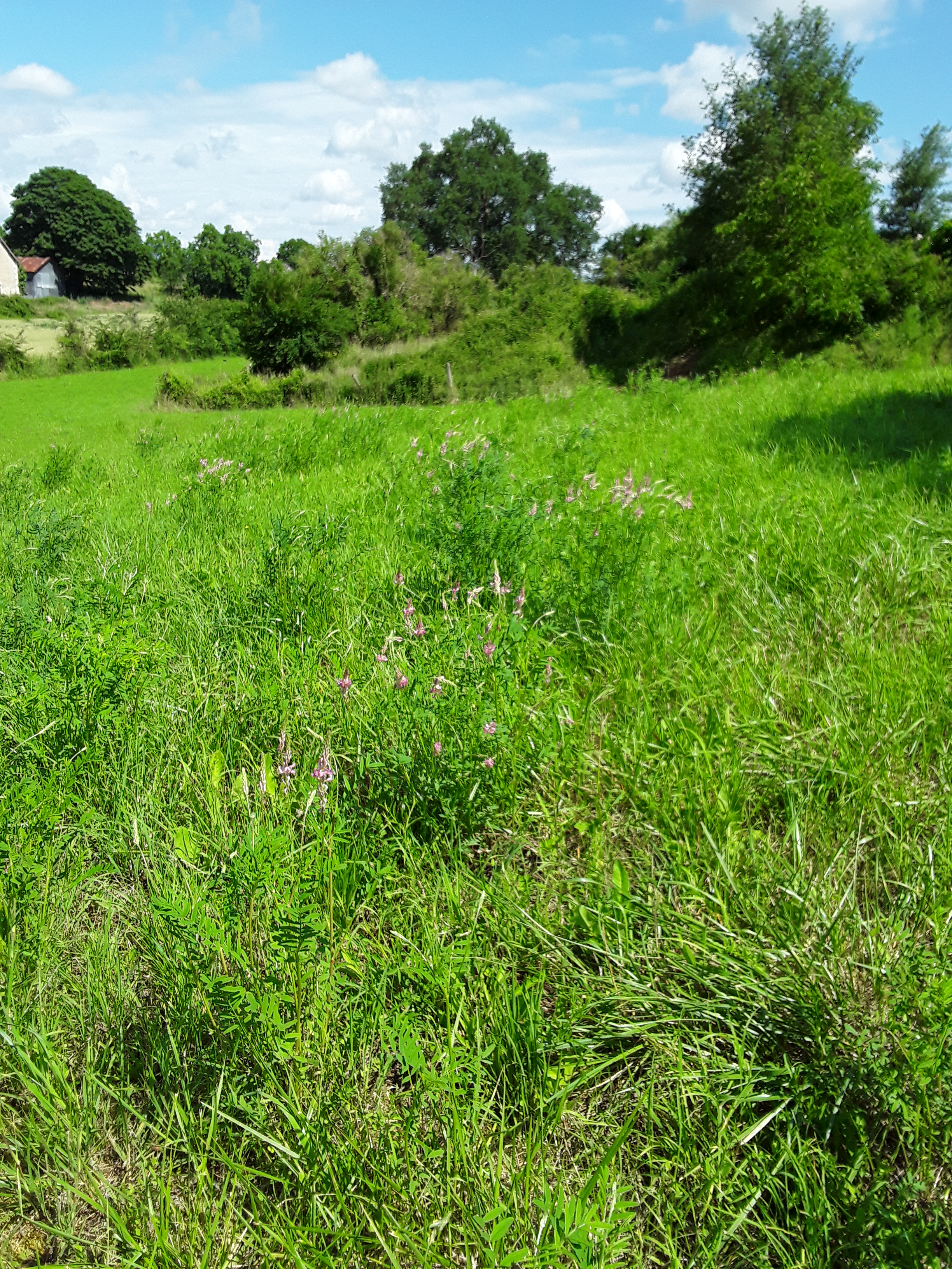 Prairie permanente Dactyle-ray-grass anlais sainfoin, agrostide-trèfle blanc. Indre-et- Loire, France, 2018